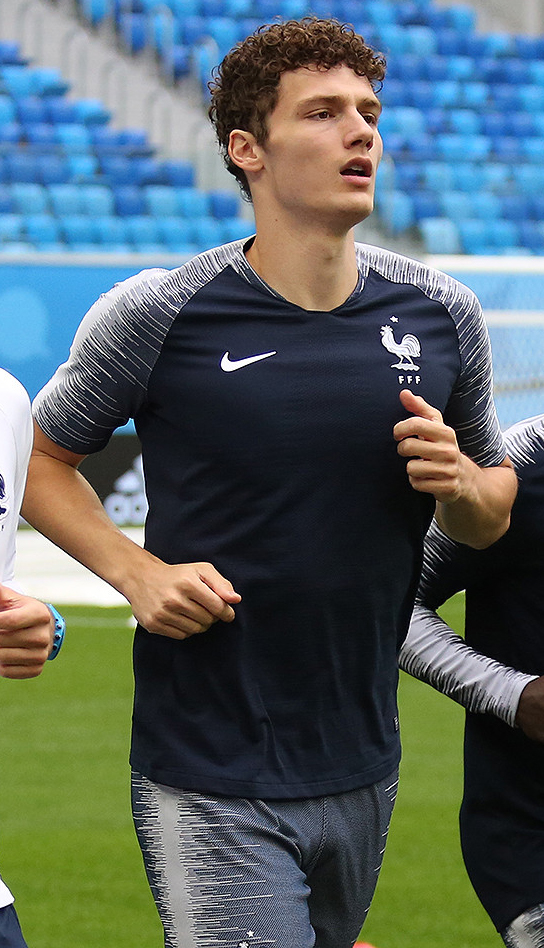 Французы и бельгийцы готовятся к полуфинальной битве